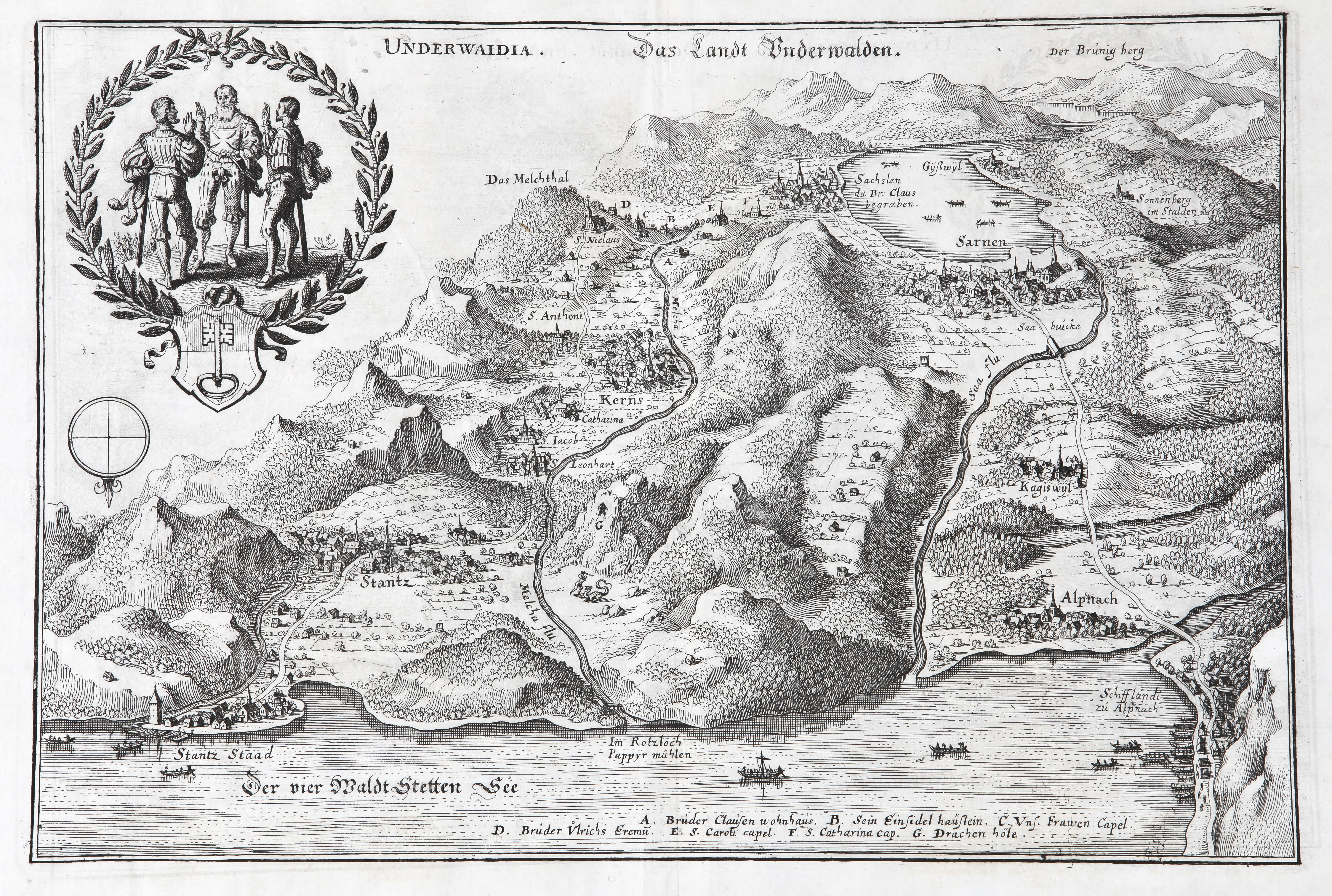 Matthäus Merians Karte "Das Landt Unterwalden" von 1650. Staatsarchiv Nidwalden OC 2/1:1